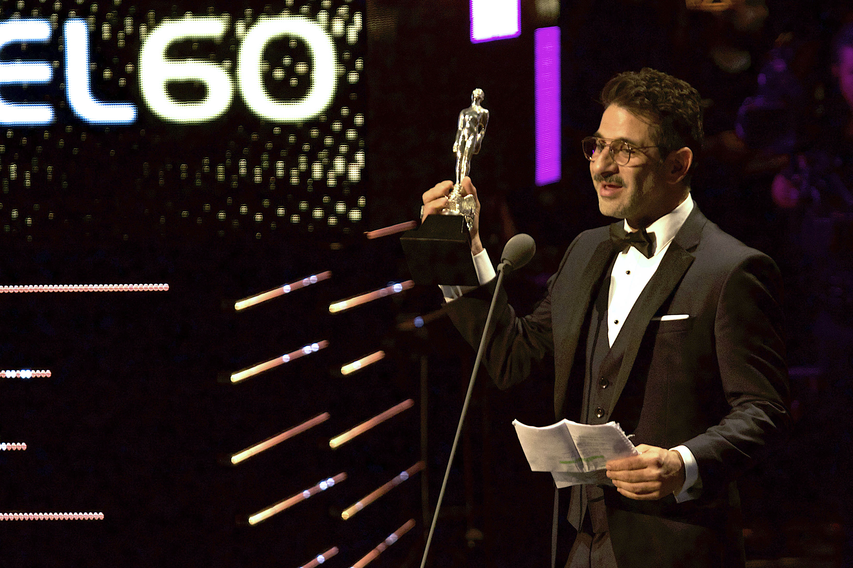 Mejor Coactuación Masculina: Miguel Rodarte, por Tiempo Compartido.